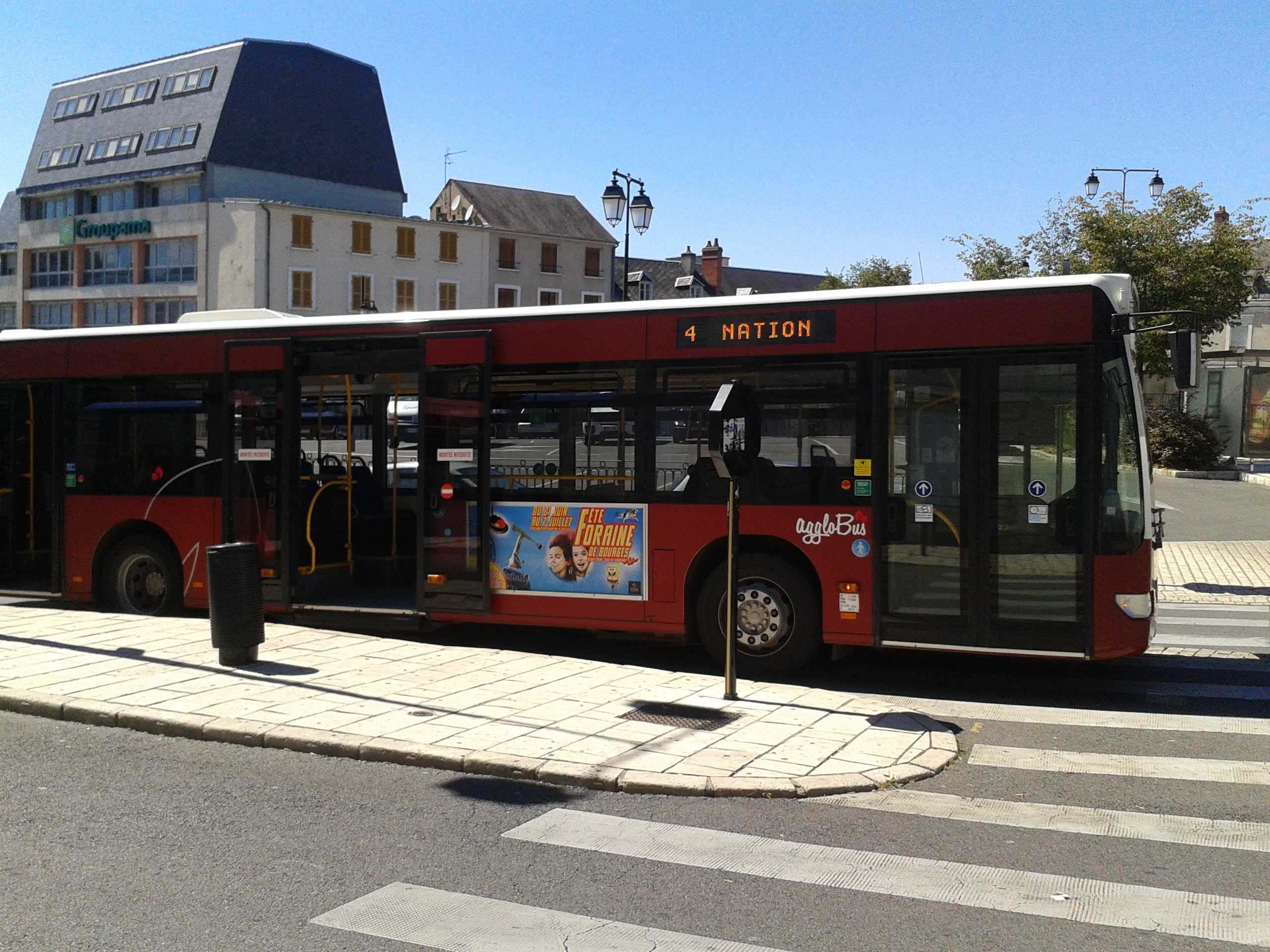 Mercedes Citaro place de la nation Bourges 2